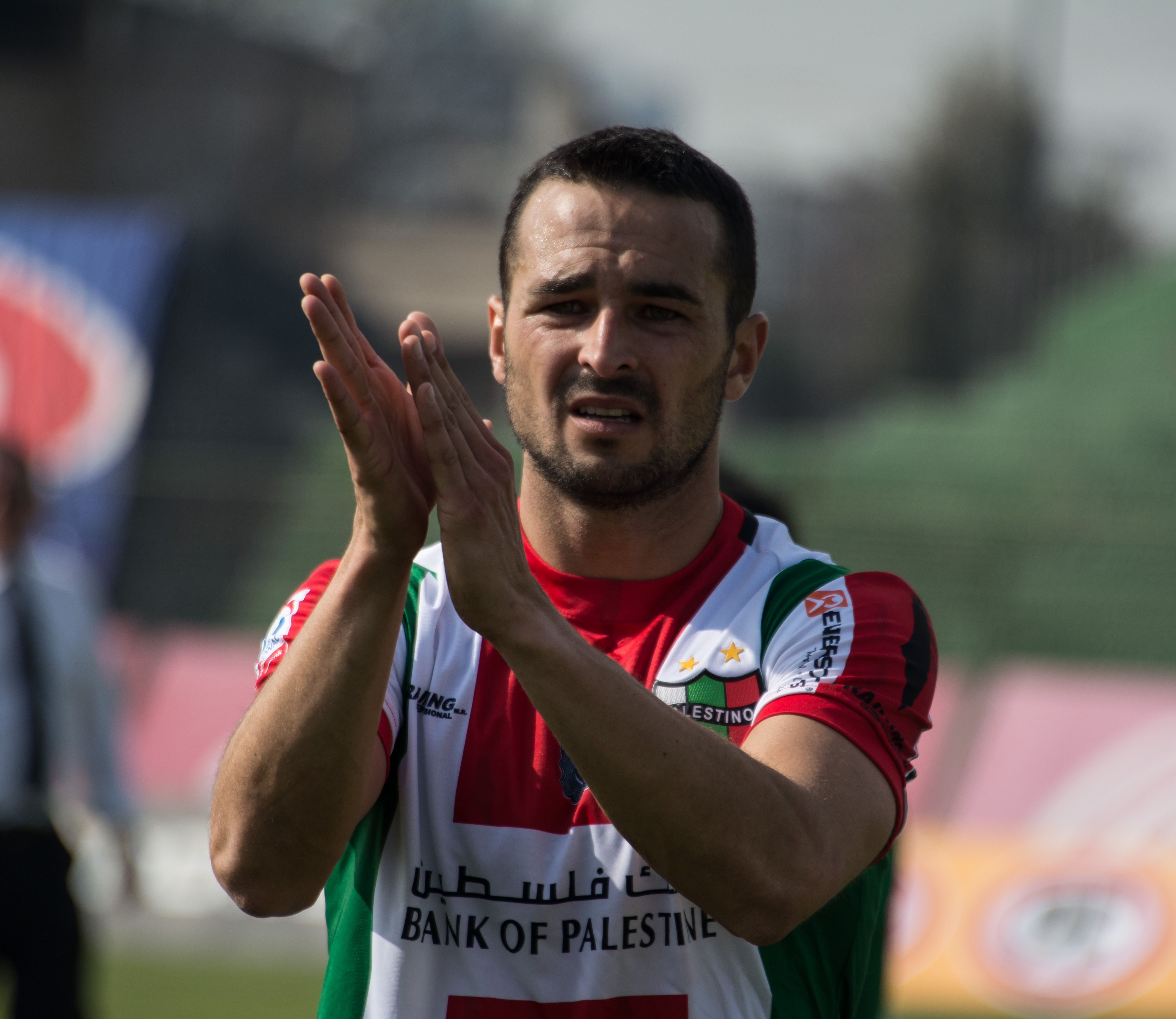 Alejandro Damián González, Palestino v Deportes Temuco, Estadio Municipal de La Cisterna, La Cisterna, Santiago, Chile